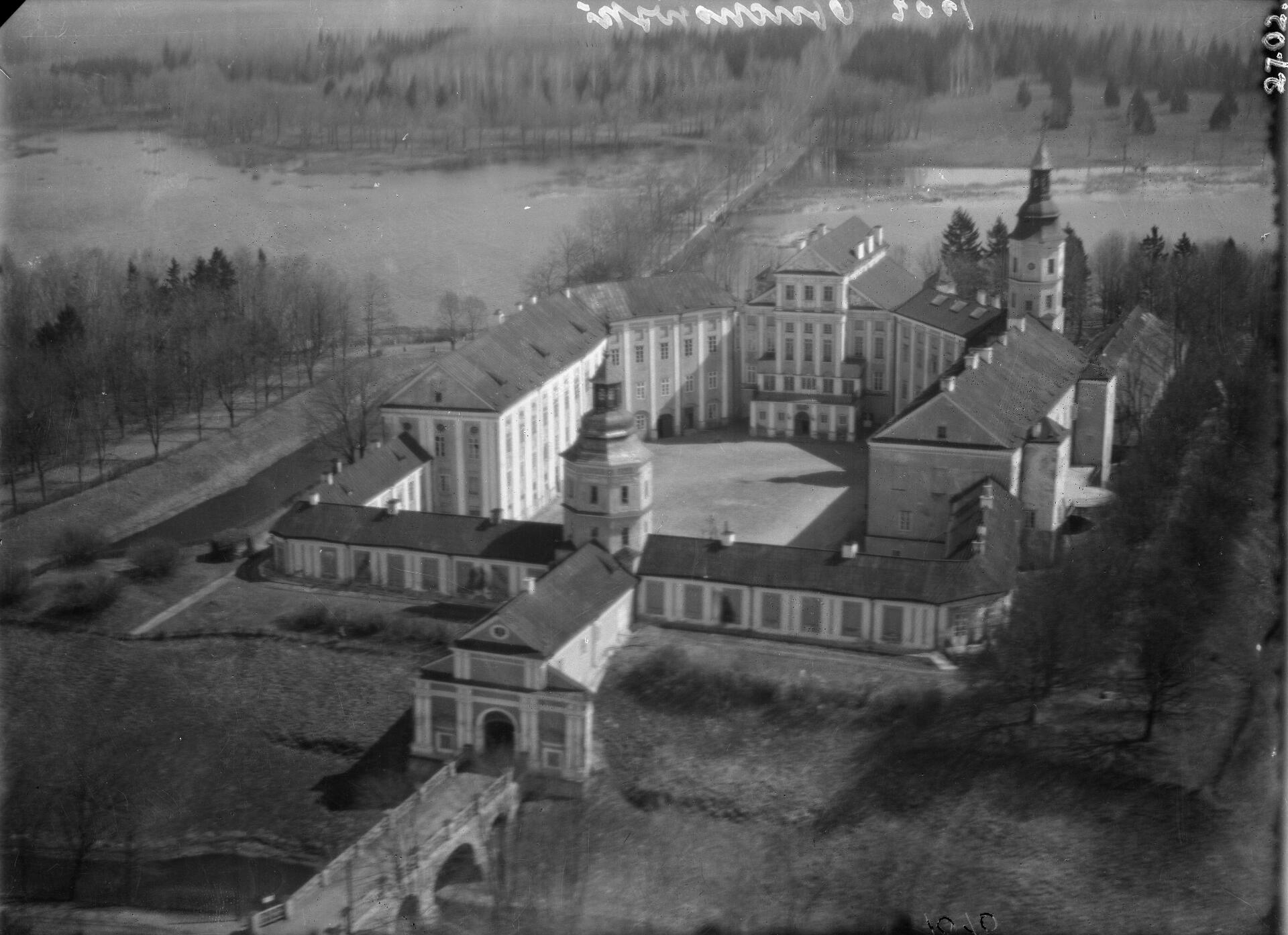 Беларуская (тарашкевіца): Нясьвіж (Niaśviž), замак Радзівілаў (Radzivił). Аэрафотаздымак